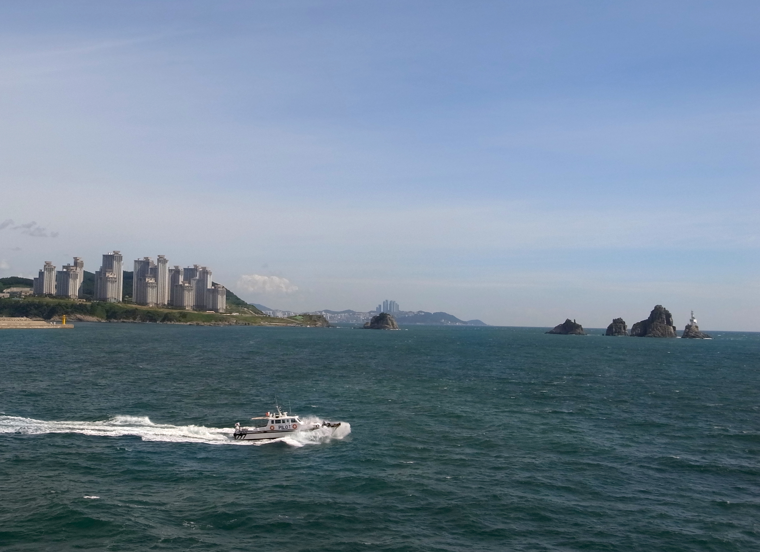 Oryuk-do (오륙도)